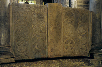 Detalle del cancel de la iglesia prerrománica de Santa Cristina de Lena, en Asturias. De origen visigodo, se construyó alrededor del siglo VII. Hay una inscripción que dice: OFFERET FLAINVS ABBA = IN ONORE APOSTOLOR(um) D(e)I = S(an)C(t)OR(um) PETRI PAVLI. Patrimonio del Pricipado de Asturias, arquitectura prerrománica, arte asturiano. Banco de imágenes del CNICE. Licencia creative commons